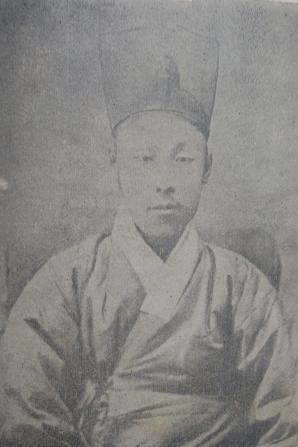 김옥균